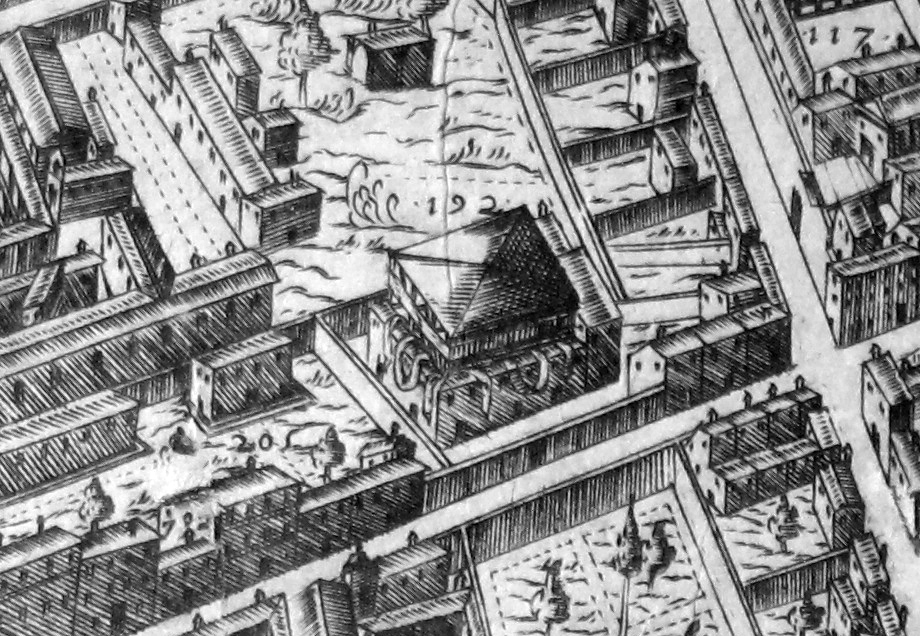 Pianta del buonsignori, dettaglio 192 tiratoio degli angeli (via Alfani)